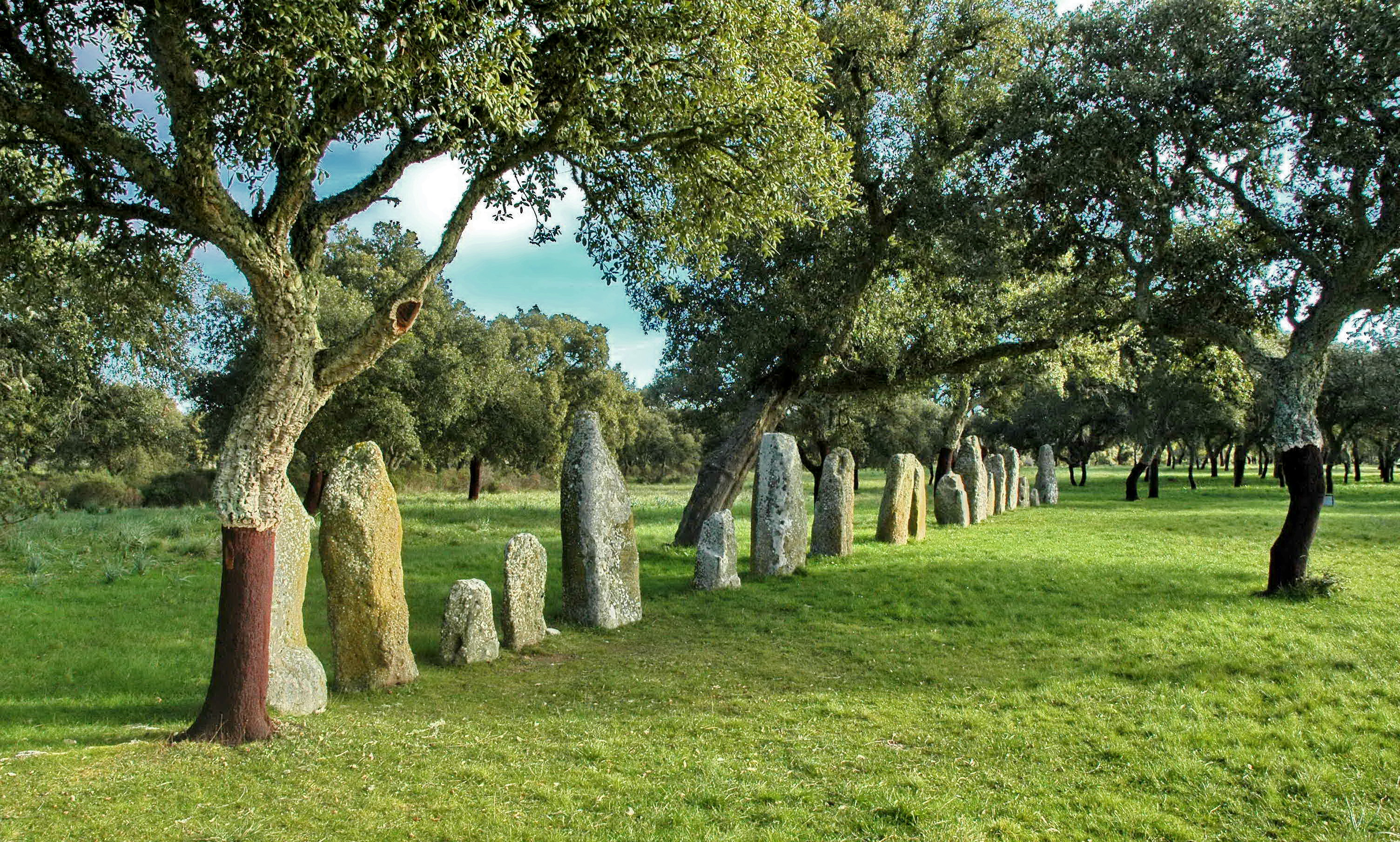 Area archeologica di Pranu Muttedu - MIBAC This is a photo of a monument which is part of cultural heritage of Italy.